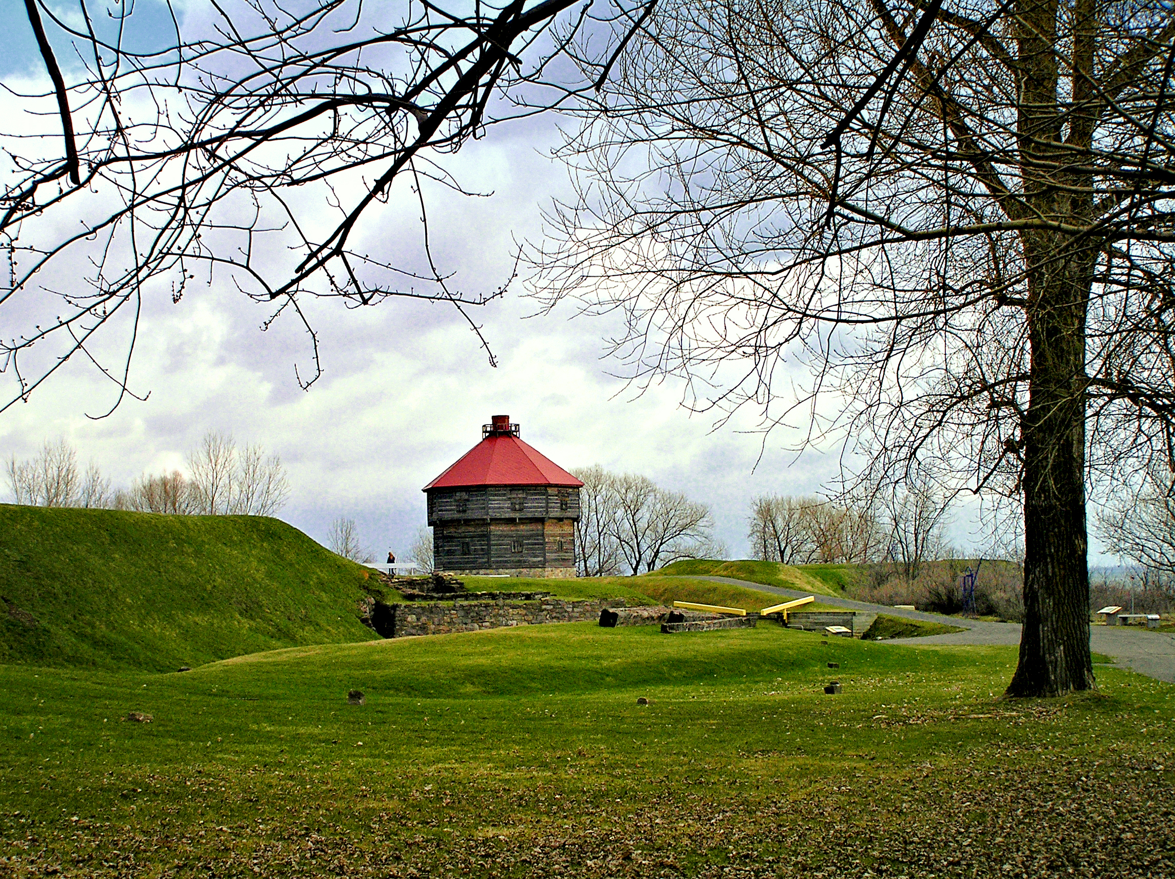 Coteau-du-Lac (Québec) - Blockhaus du Parc Canada